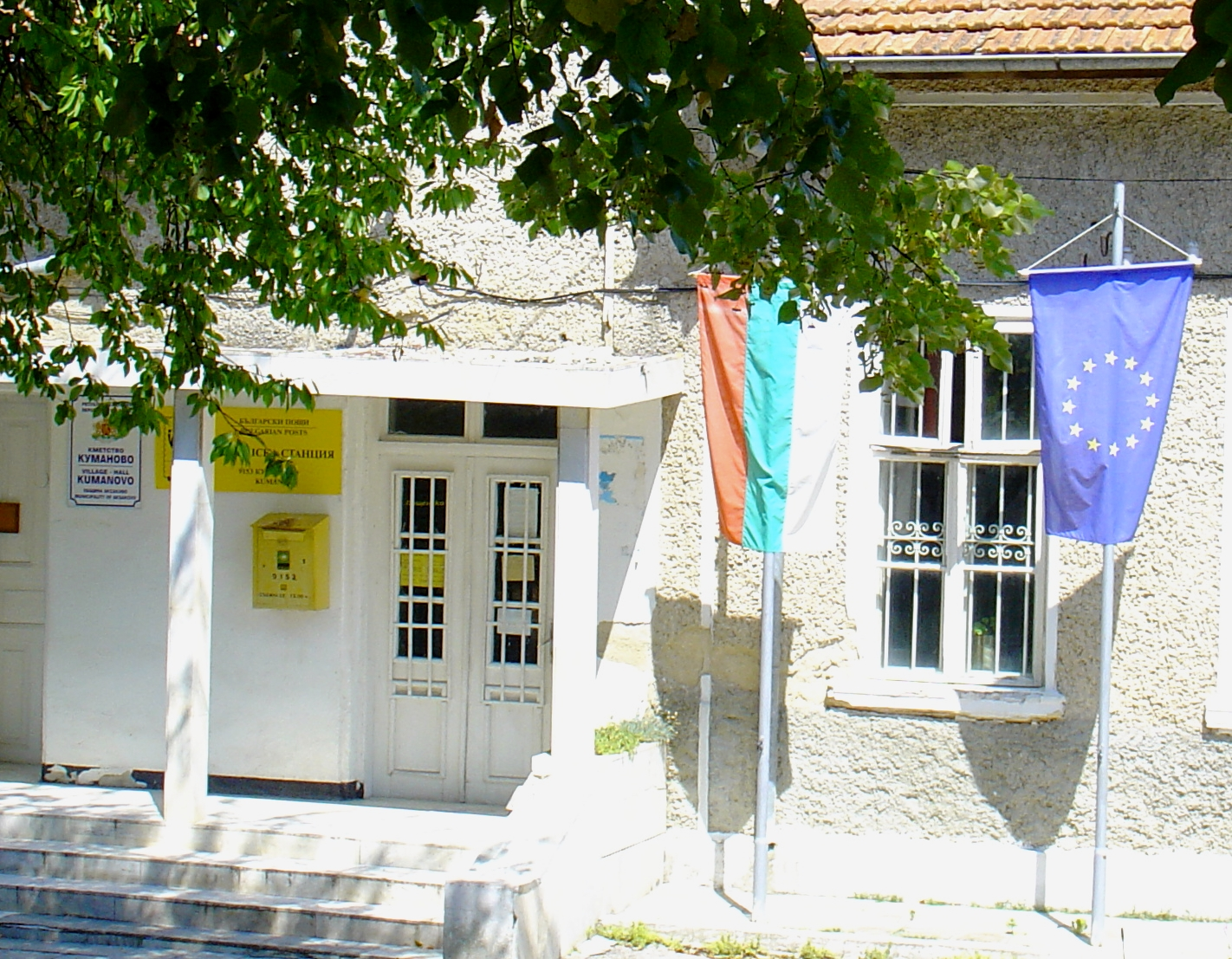 Кметството на село Куманово, България